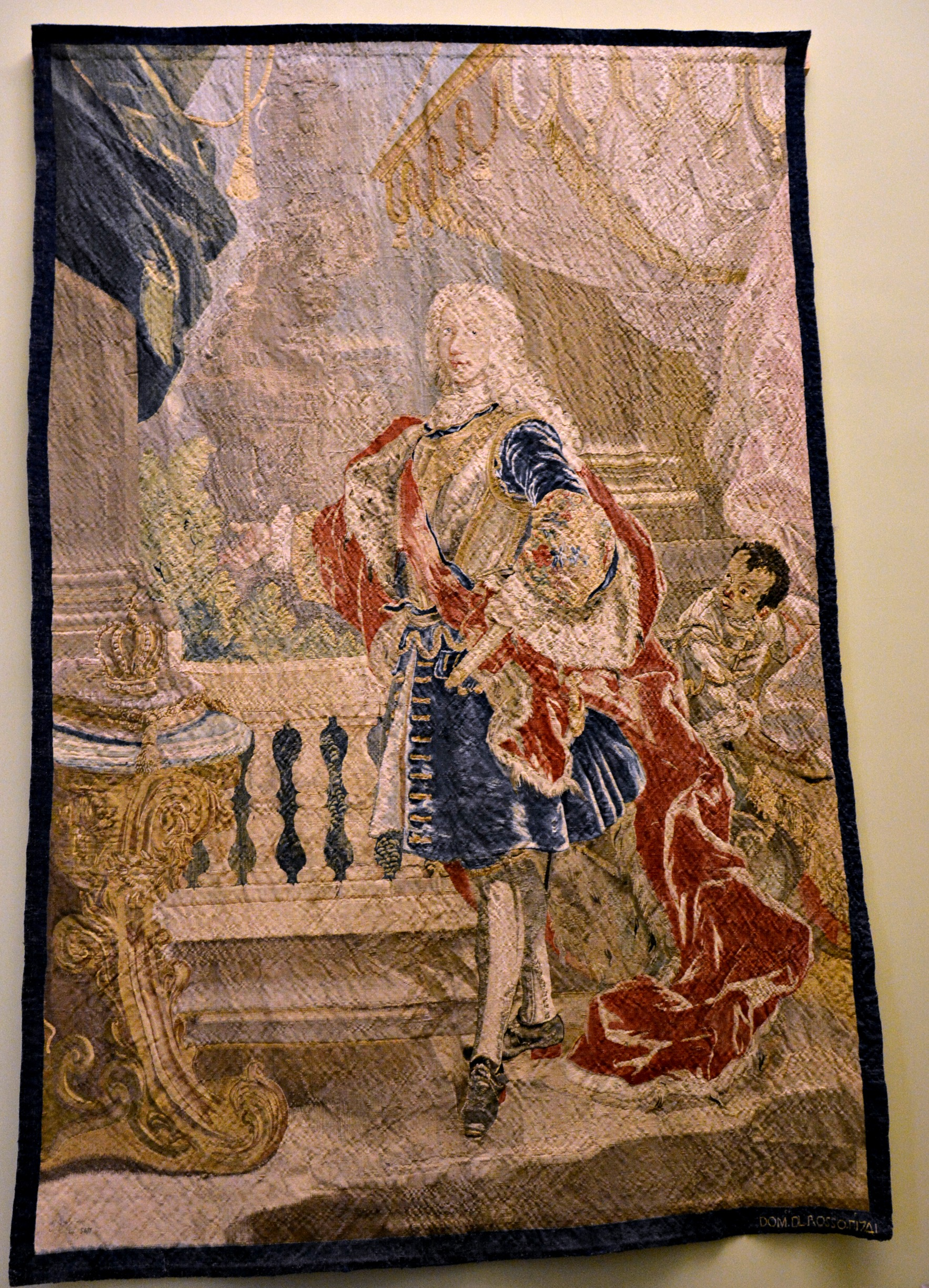 Vedi titolo